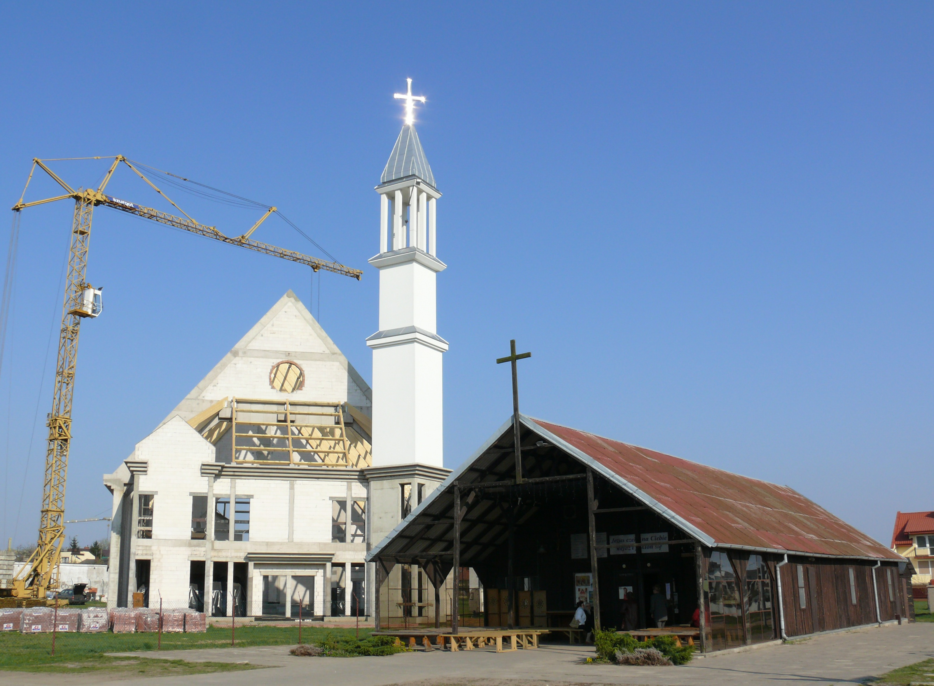 Budowany kościół Świętego Bogumiła w Kole